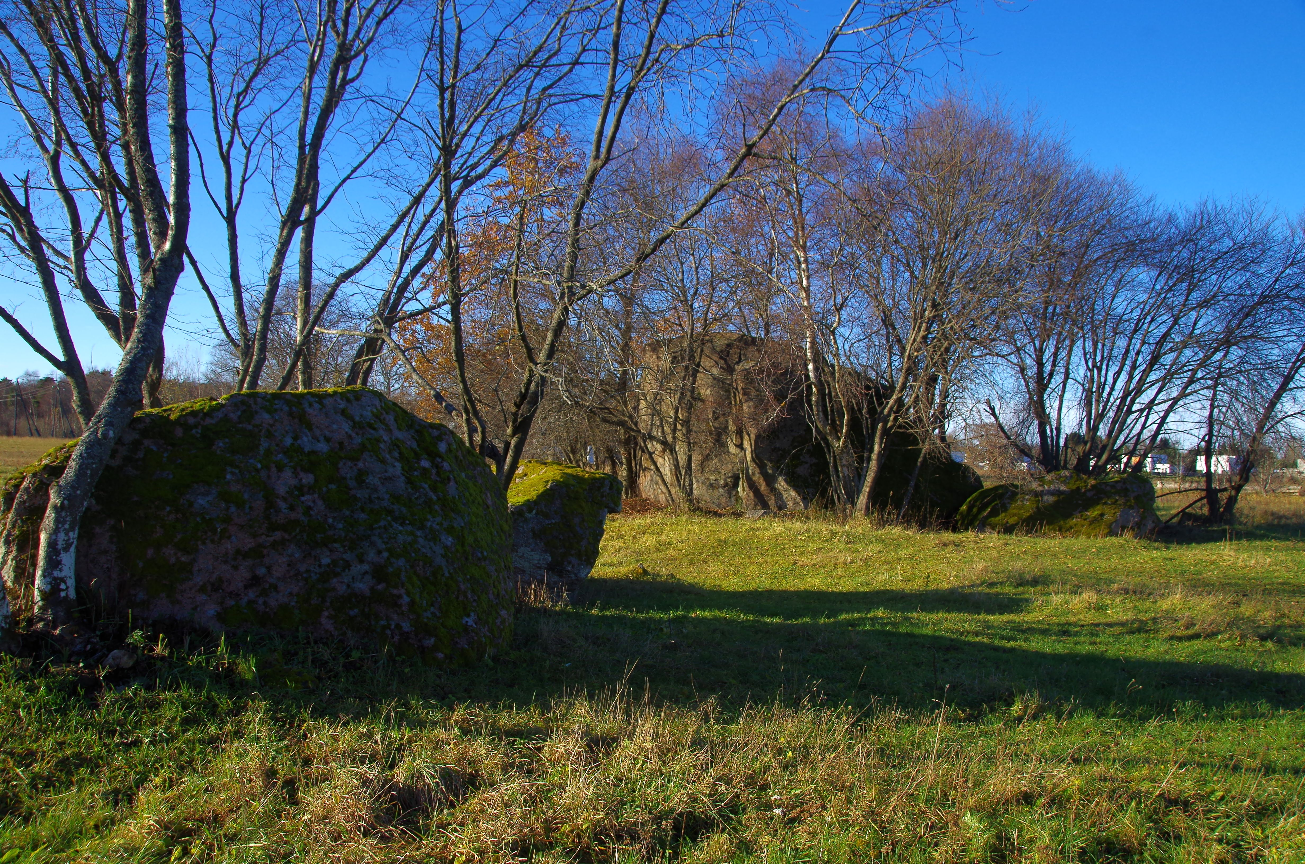 Pärnamäe rahnud on neli kaitstavat rändrahnu Harju maakonnas Viimsi vallas.Neljast rahnust suurim – Pärnamäe rahn – on mõõtmete poolest hiidrahn. Kkivi mõõtmed on : pikkus 12,7, laius 9,2, kõrgus 5,8 ja ümbermõõt 31,1 m